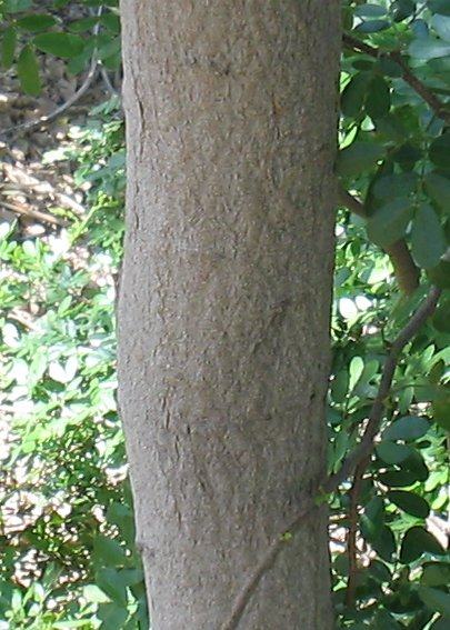 Acacia rigidula bark